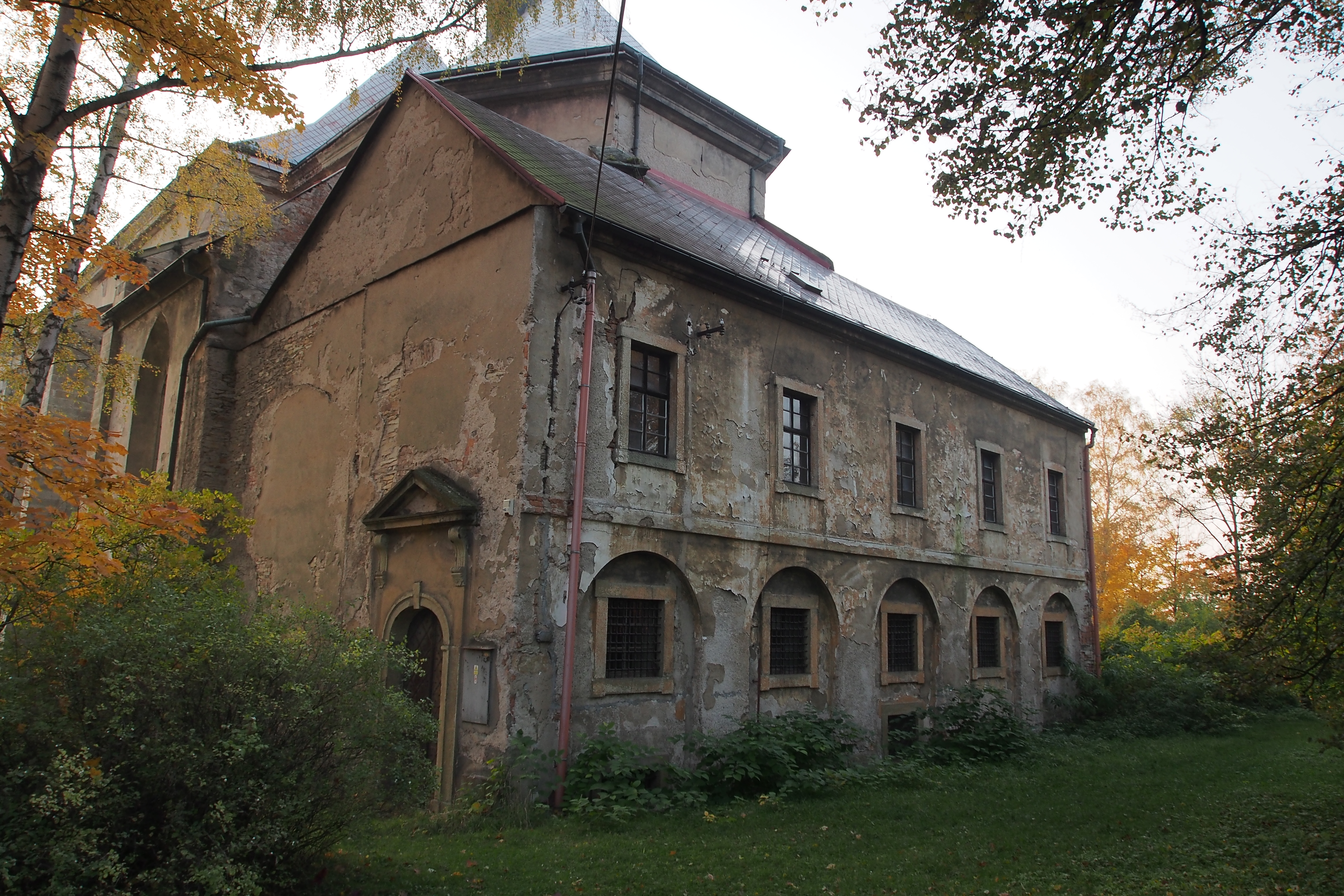 torzo piaristické koleje v Rychnově nad Kněžnou